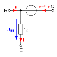 Kleinsignalmodell vereinfacht